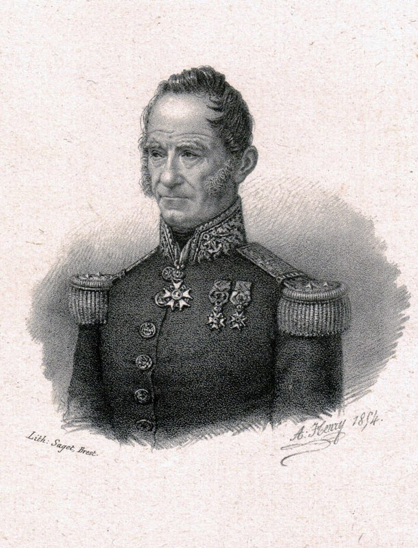 Charles Louis Joseph Bazoche. Photographie d'une gravure : portrait du contre-amiral Bazoche